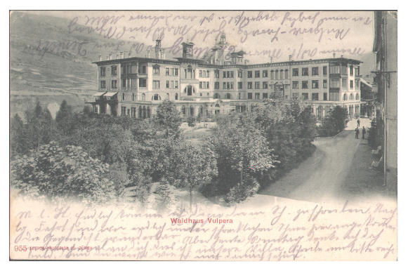 Hotel Waldhaus Vulpera, Ansichtskarte, gelaufen 1907